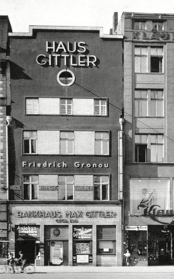 Kamienica n5 we wrocławskim Rynku. Wygląd z lat ok 1925 z modernistyczną fasadą